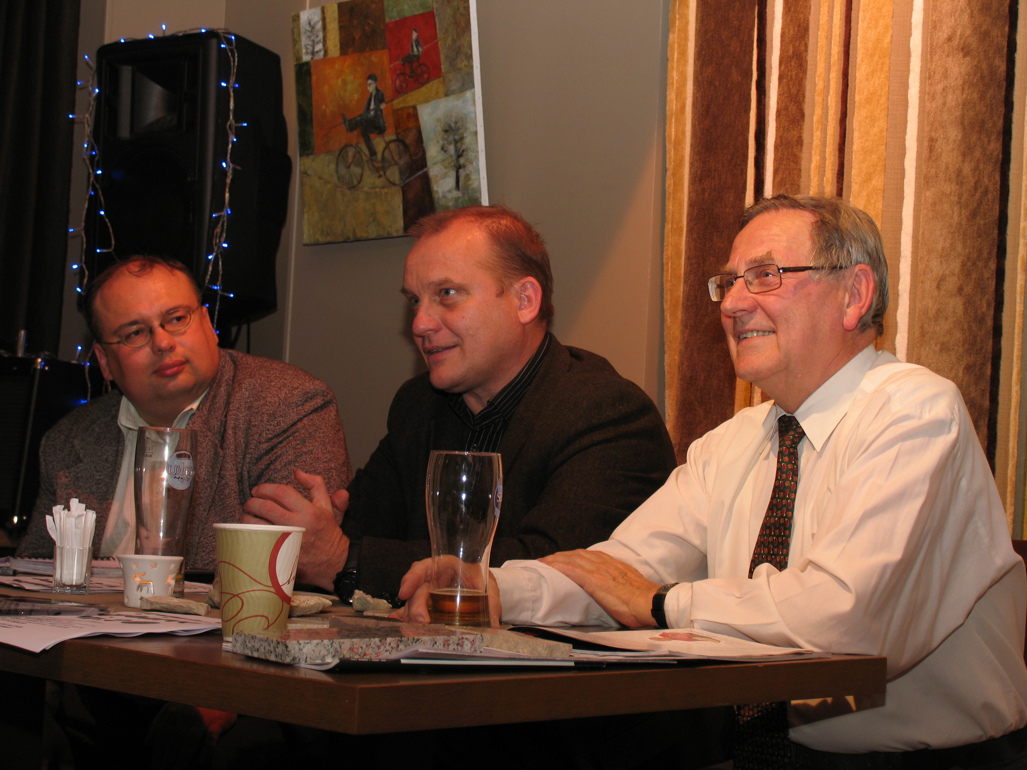 Vasakult paremale: Priit Ennet, Alvar Soesoo ja Rein Einasto.